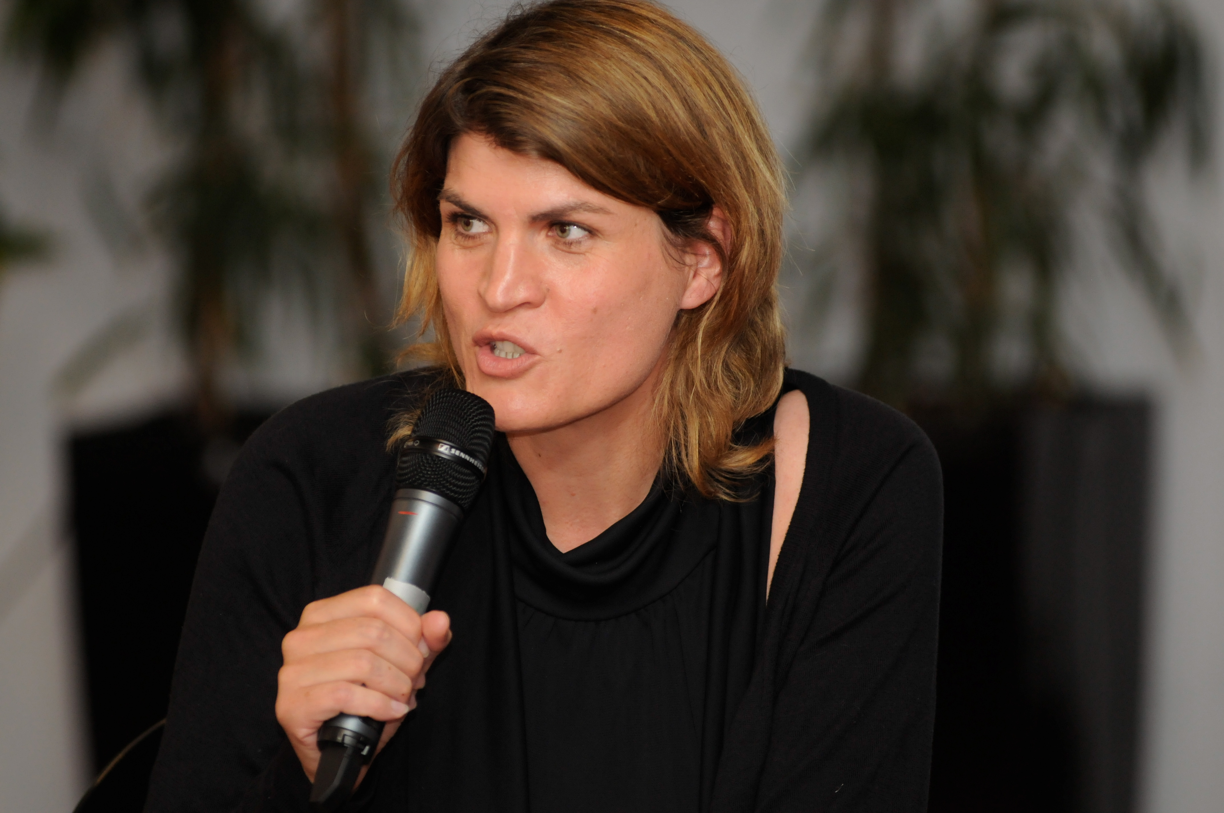 Claudia Stamm (Sprecherin für Gleichstellung, Bündnis '90/Die Grünen Bayern) Foto: Ruth Plössel